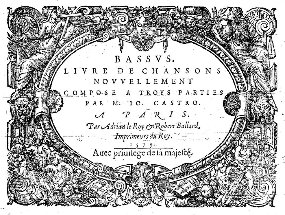 Title page of Jean de Castro Chansons, 1575